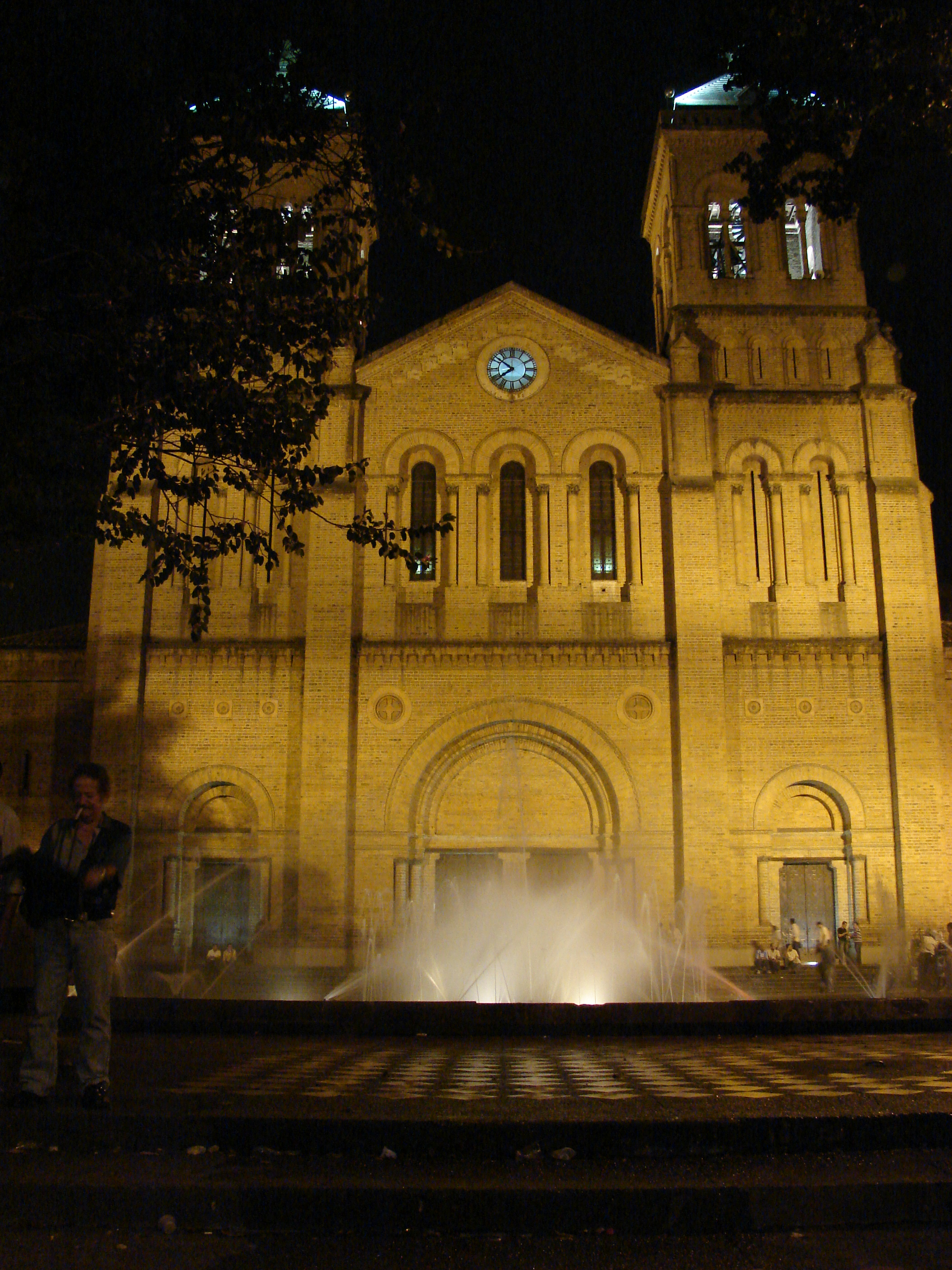 Atrio de la Catedral Metropolitana de Medellín